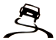 Voorbeeld bitmap naar vector omzetting, gemaakt met opensource programma Inkscape.